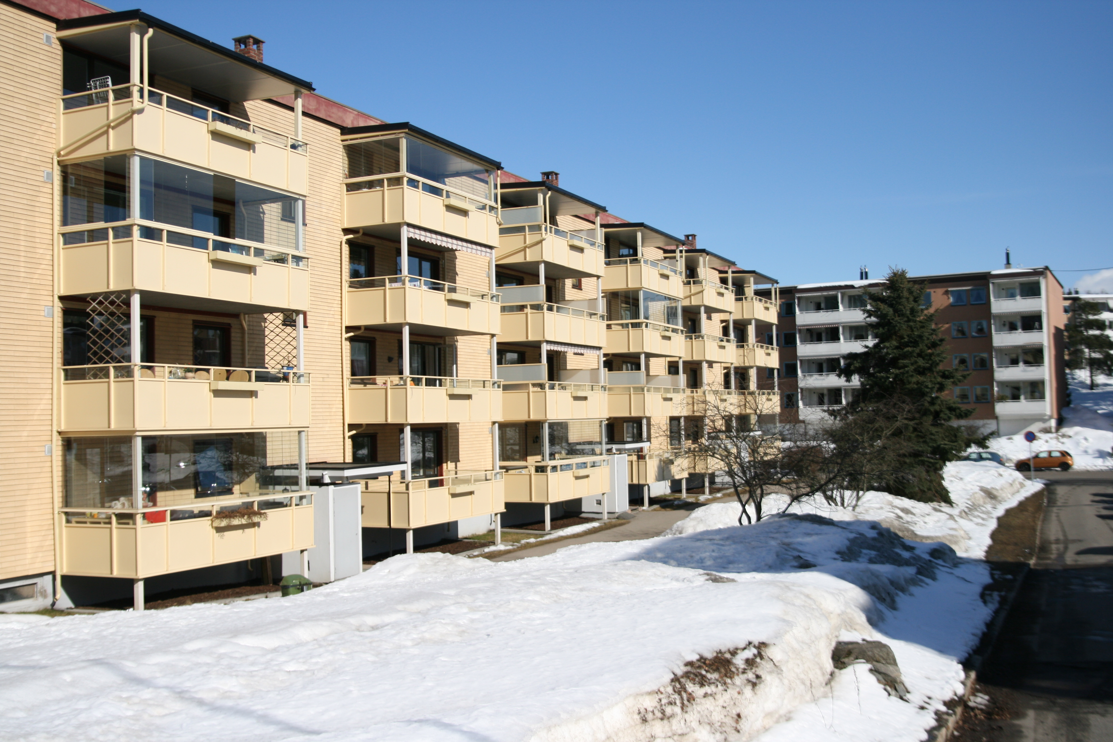 Kranveien 1-5 på Oppsal i Oslo.